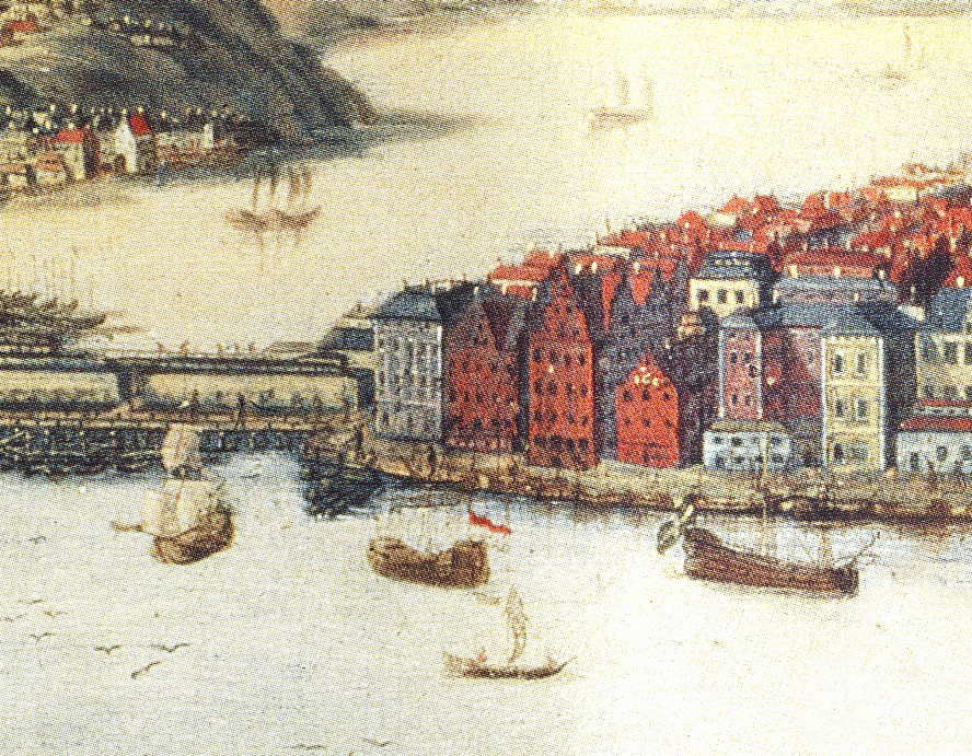 Skeppsbron i Stockholm kring 1700, målning efter Willem Swiddes gravyr "Stockholm från Kastellholmen" från 1693, Räntmästarhuset längs till vänster.